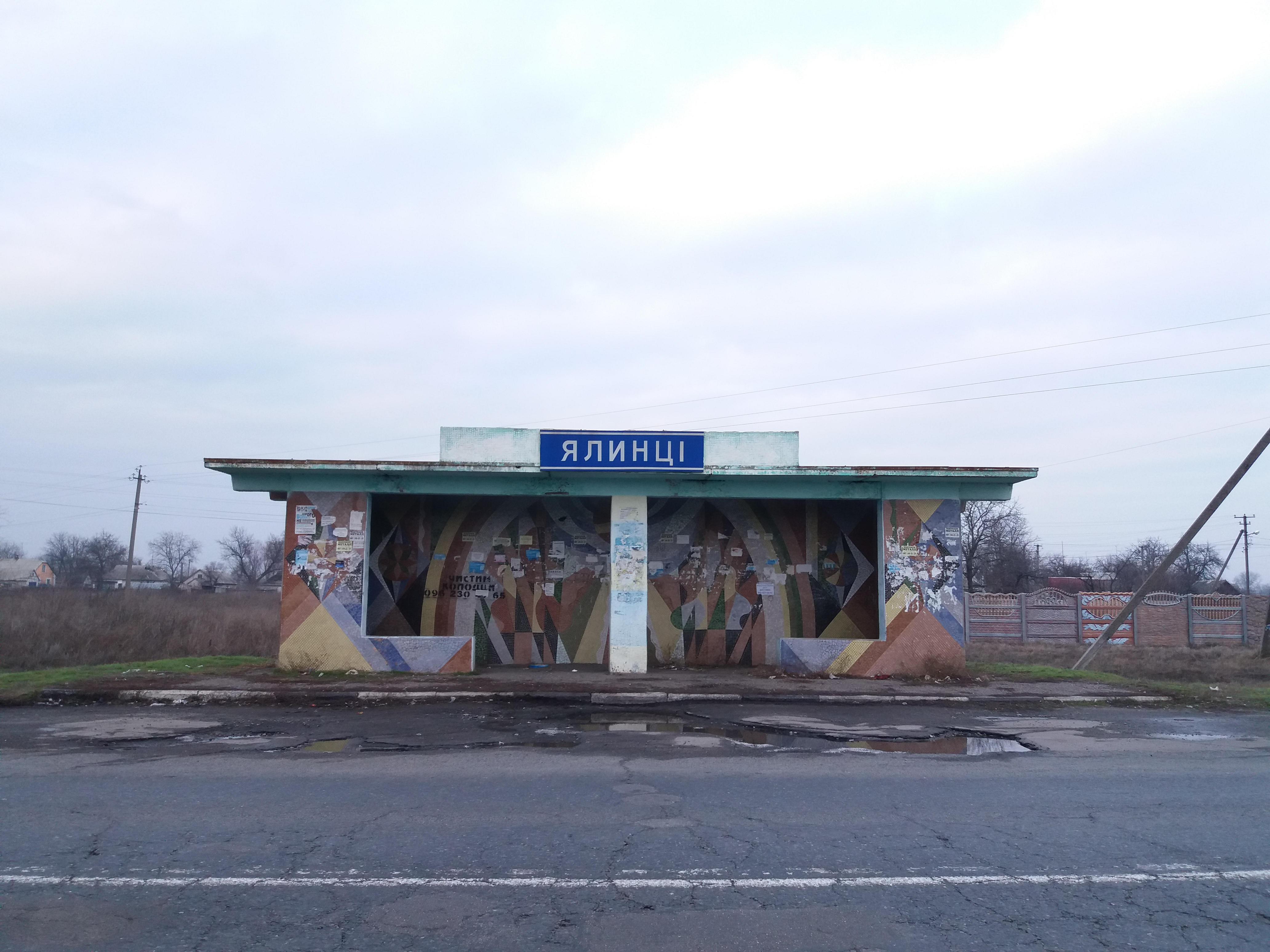 Автобусна зупинка в селі Ялинці Кременчуцького району